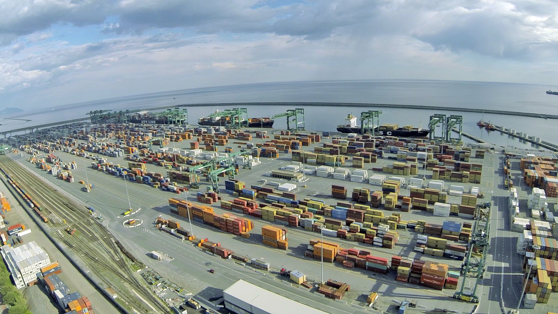 Veduta aerea del piazzale principale